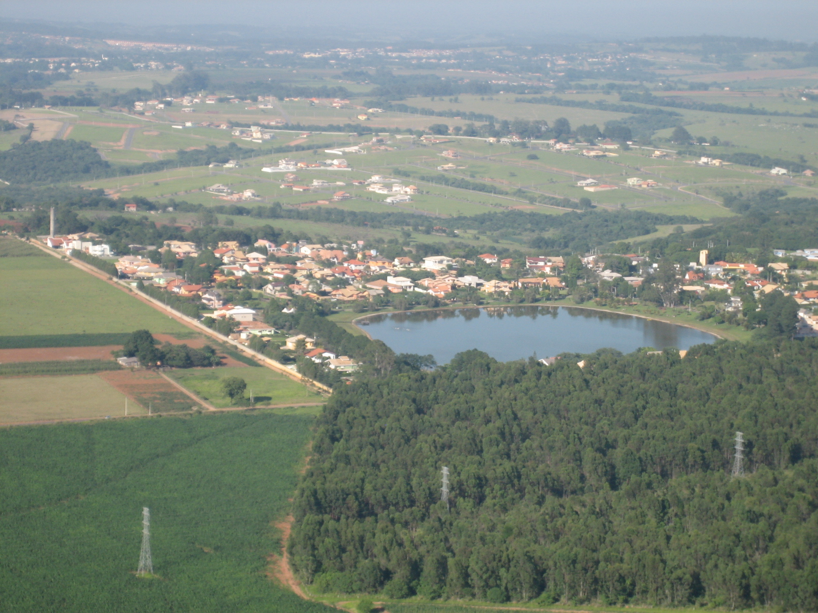 Vivendas do Lago - Balonismo - Sorocaba - SP